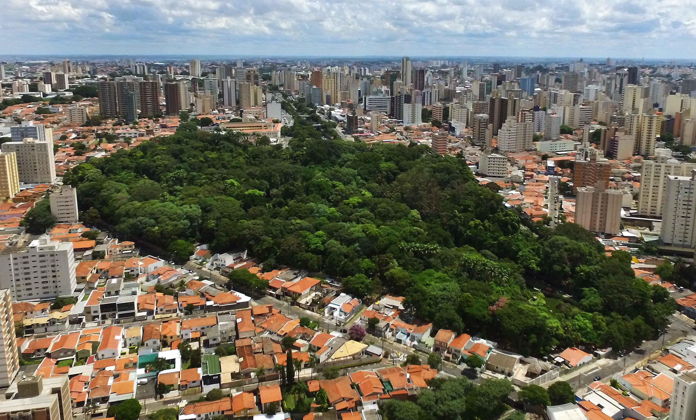 Foto Carlos Bassan